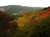 Aufnahme des Tales Bächergrund bei Lorch, Rheingau, Hessen.